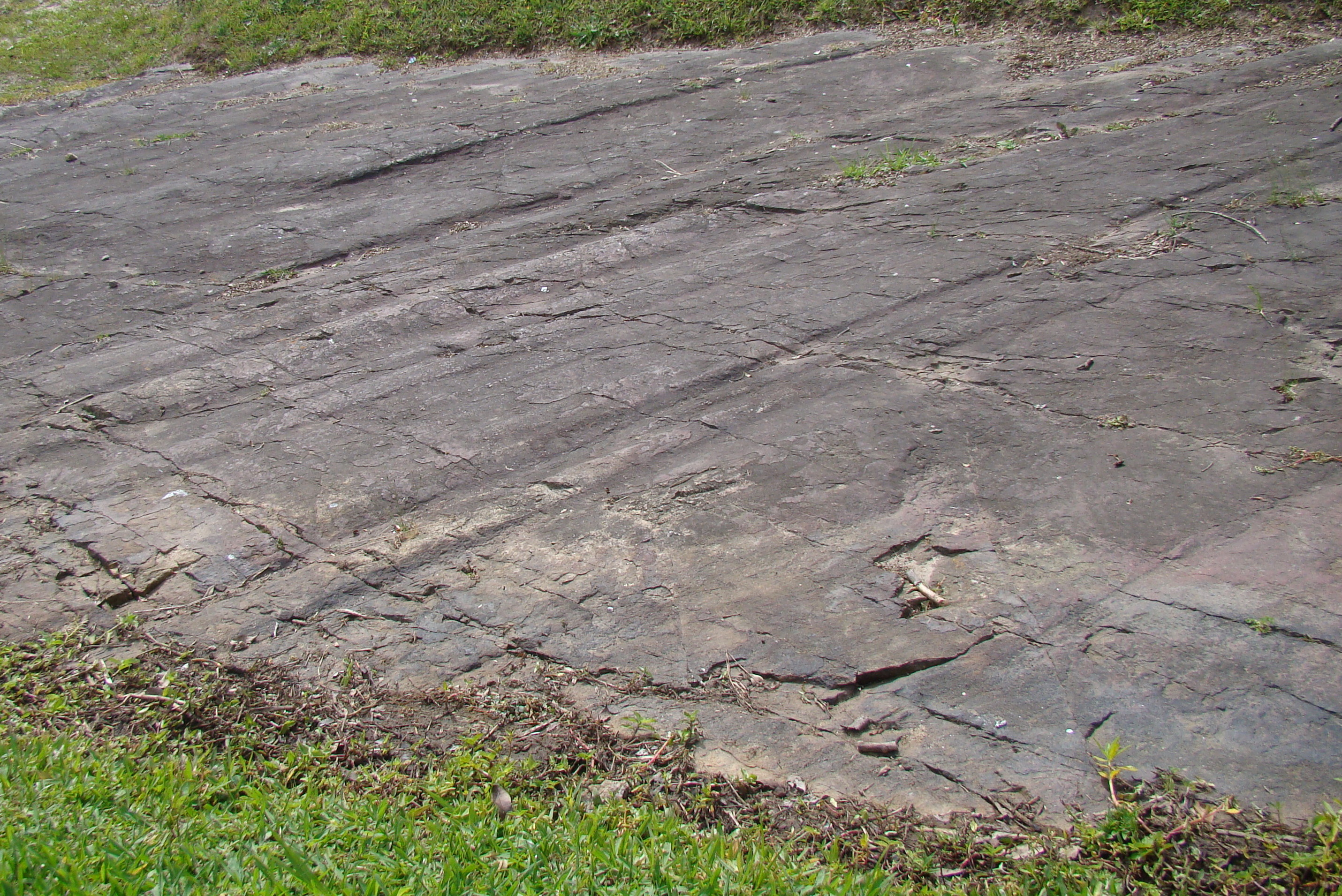 Sítio geológico na Colônia Witmarsum, Paraná, Sul do Brasil. Pavimento estriado formado na Era Paleozóica durante a Era Glacial do Gondwana. Comprova a presença de geleiras no passado geológico do Brasil, comprova que o Brasil fez parte do Gondwana e é único no país.